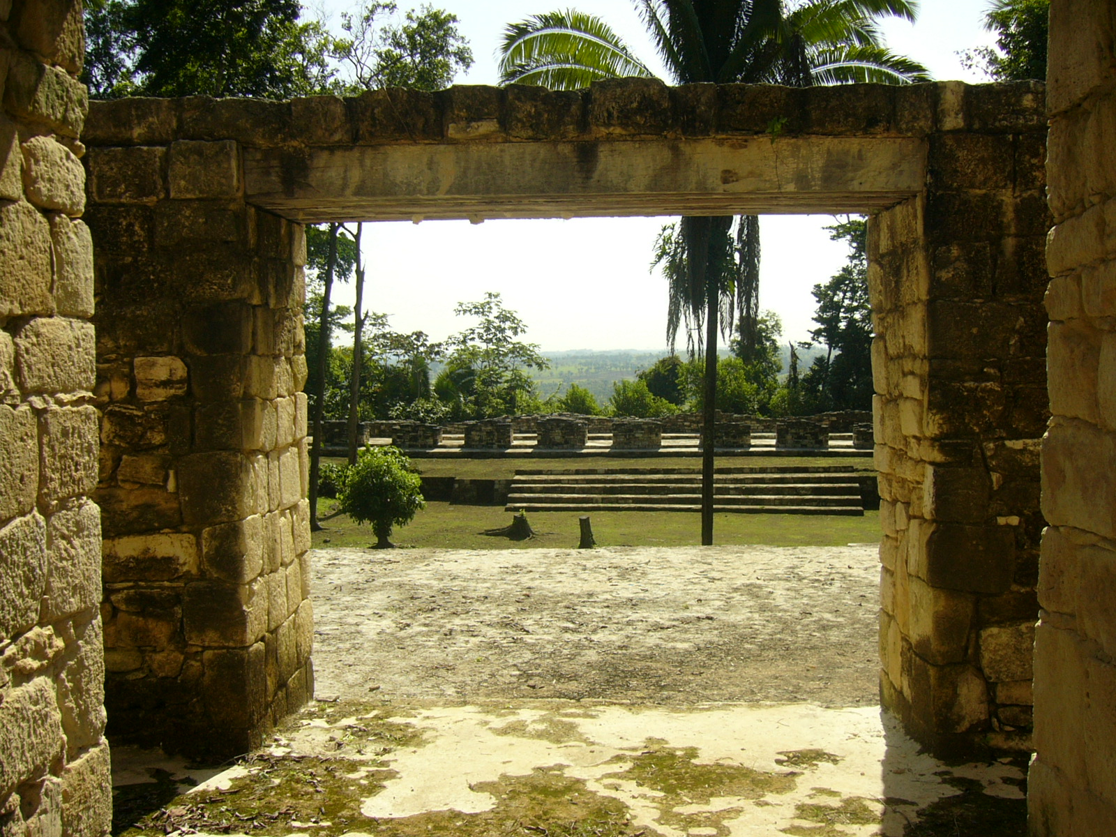 Temple Seigeur Aguateca 18-10-2006